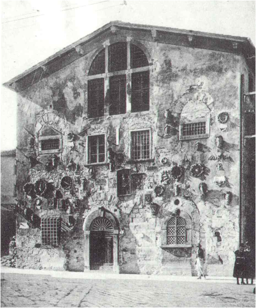 Palazzo delle Carceri di Borgo San Lorenzo da edibire a Museo Civico. Foto storica archivio Ungania proprietà Aldo Giovannini